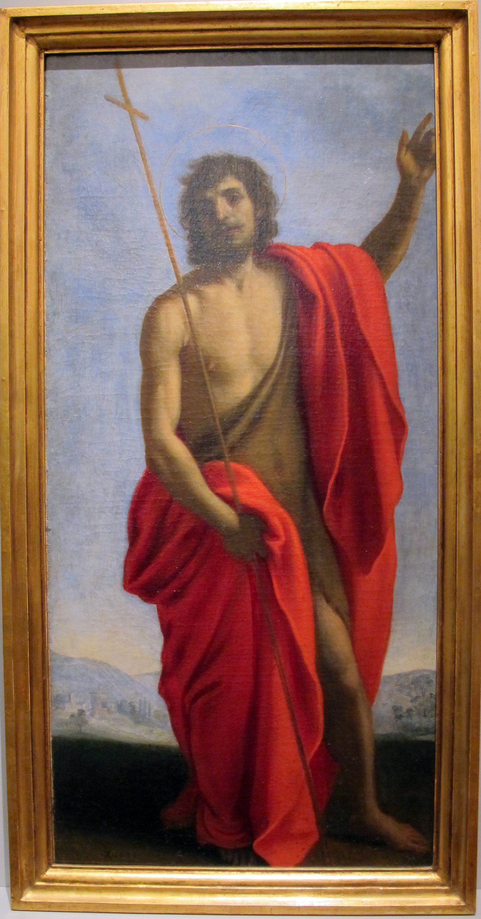 Museo Masaccio, Reggello